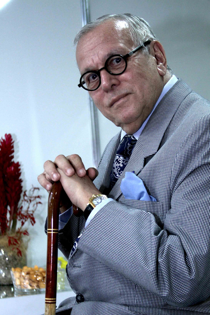 Jornalista brasileiro Marcos Vilaça recebe do Ministério da Cultura a "Ordem do Mérito Cultural" (OMC), em cerimônia realizada em 09/11/2011 no Teatro de Santa Isabel, em Recife (PE).